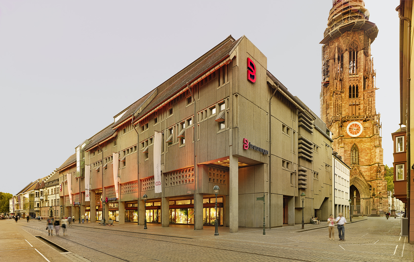 ТД "Бройнингер", г. Фрайбург